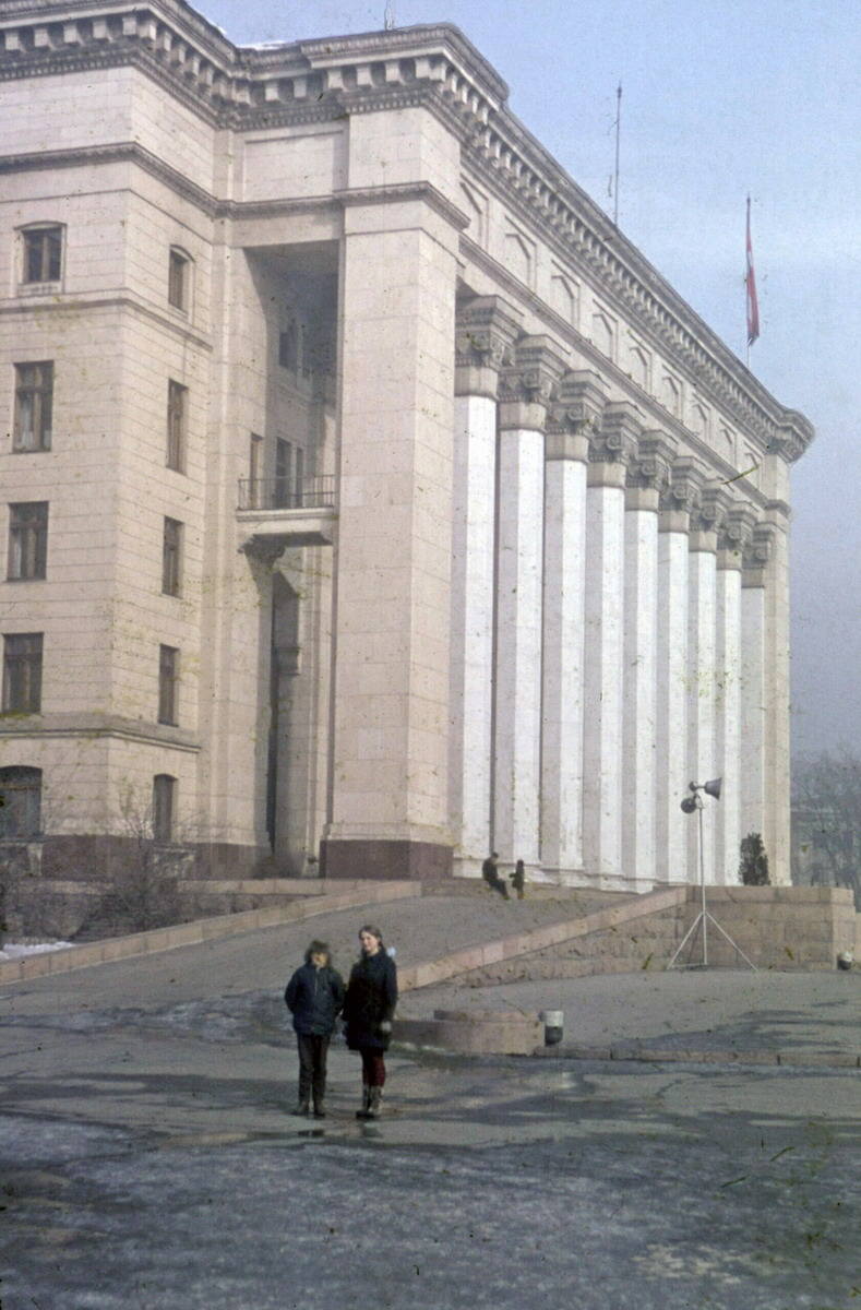 1969 ЦК Компартии Казахстана